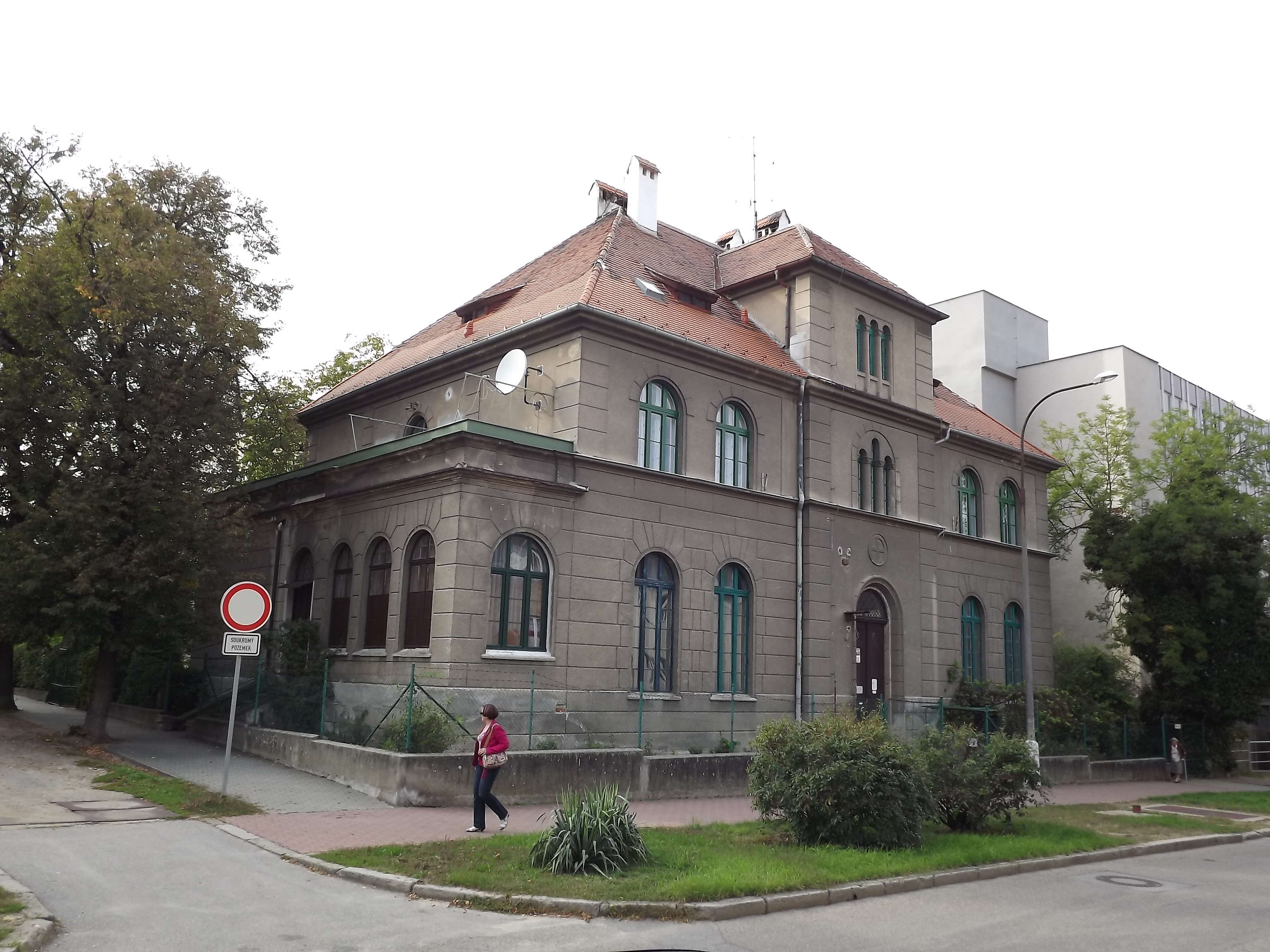 Fara u sv. Jana, Generála Svobody 421/12, České Budějovice